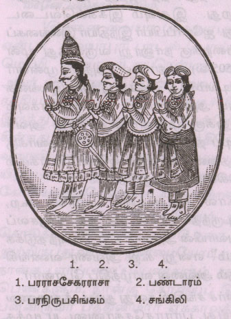 The Members of the Royal Family of Jaffna Cinkai Arya Cakravarti Pararacacekaran (VI) 1478-1519 Paddaththukkuriya Ilavarasan Pandaram Ilavarasan Paranirupasinghan Cinkai Arya Cakravarti Cankili Raja (I) Cekaracacekaran (VII) 1519-1561